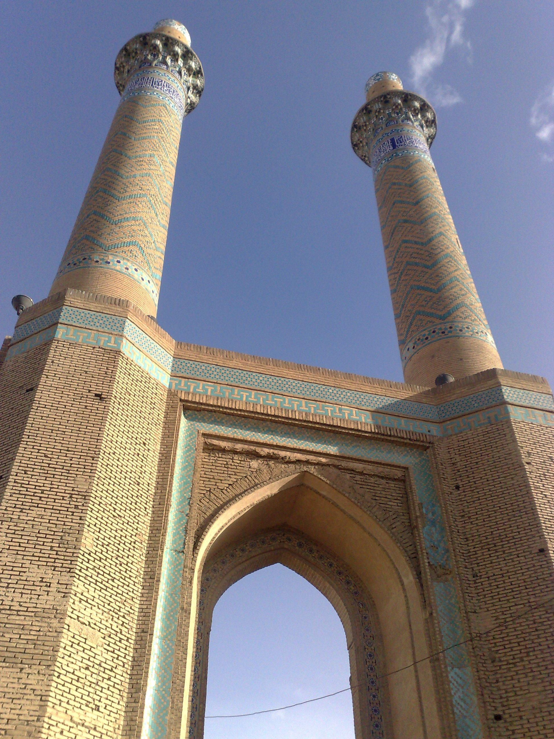 بنای سلجوقی دارالضیافه در محله جوباره اصفهان